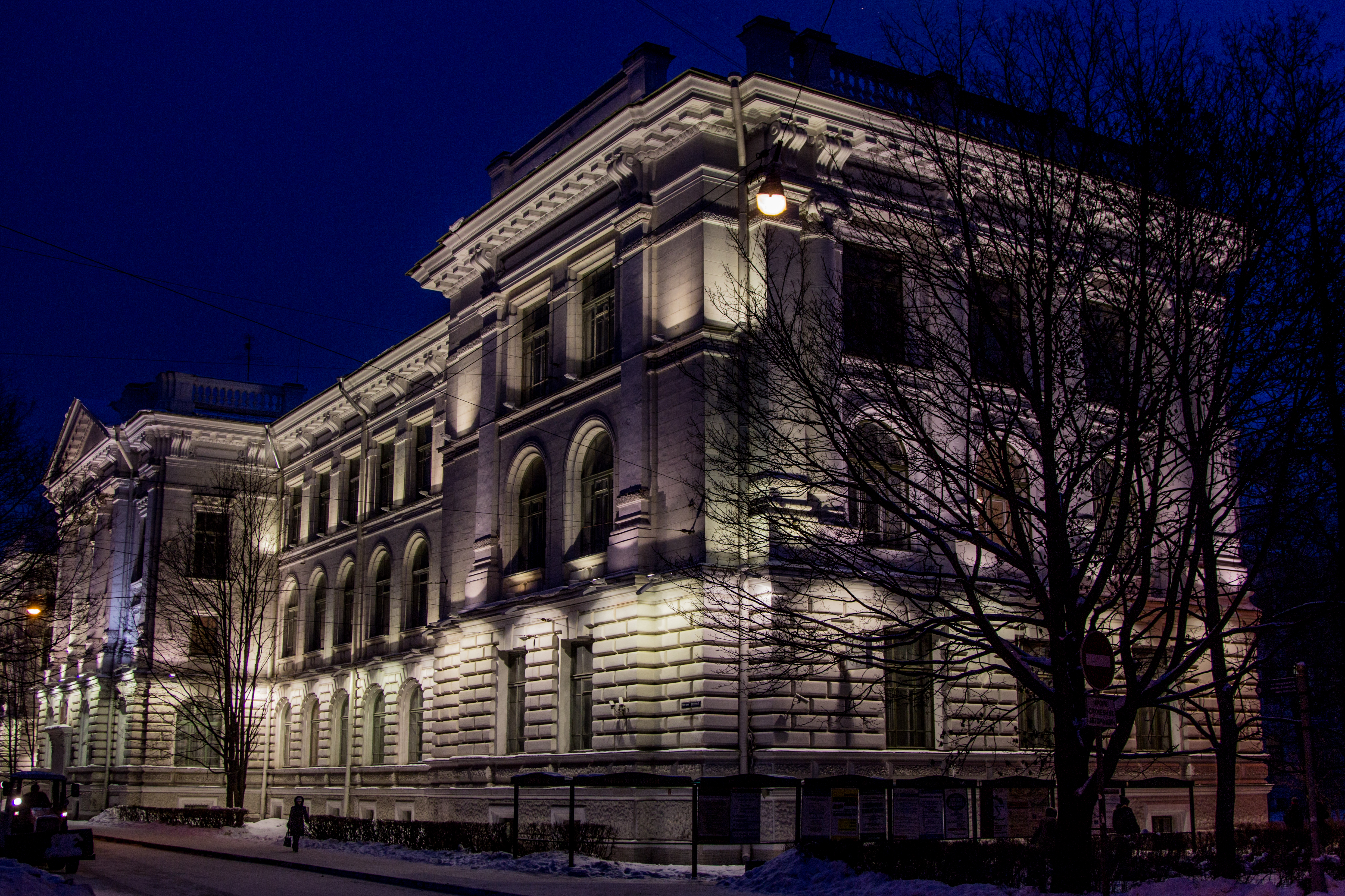 Главное здание СПБГПУ ночью